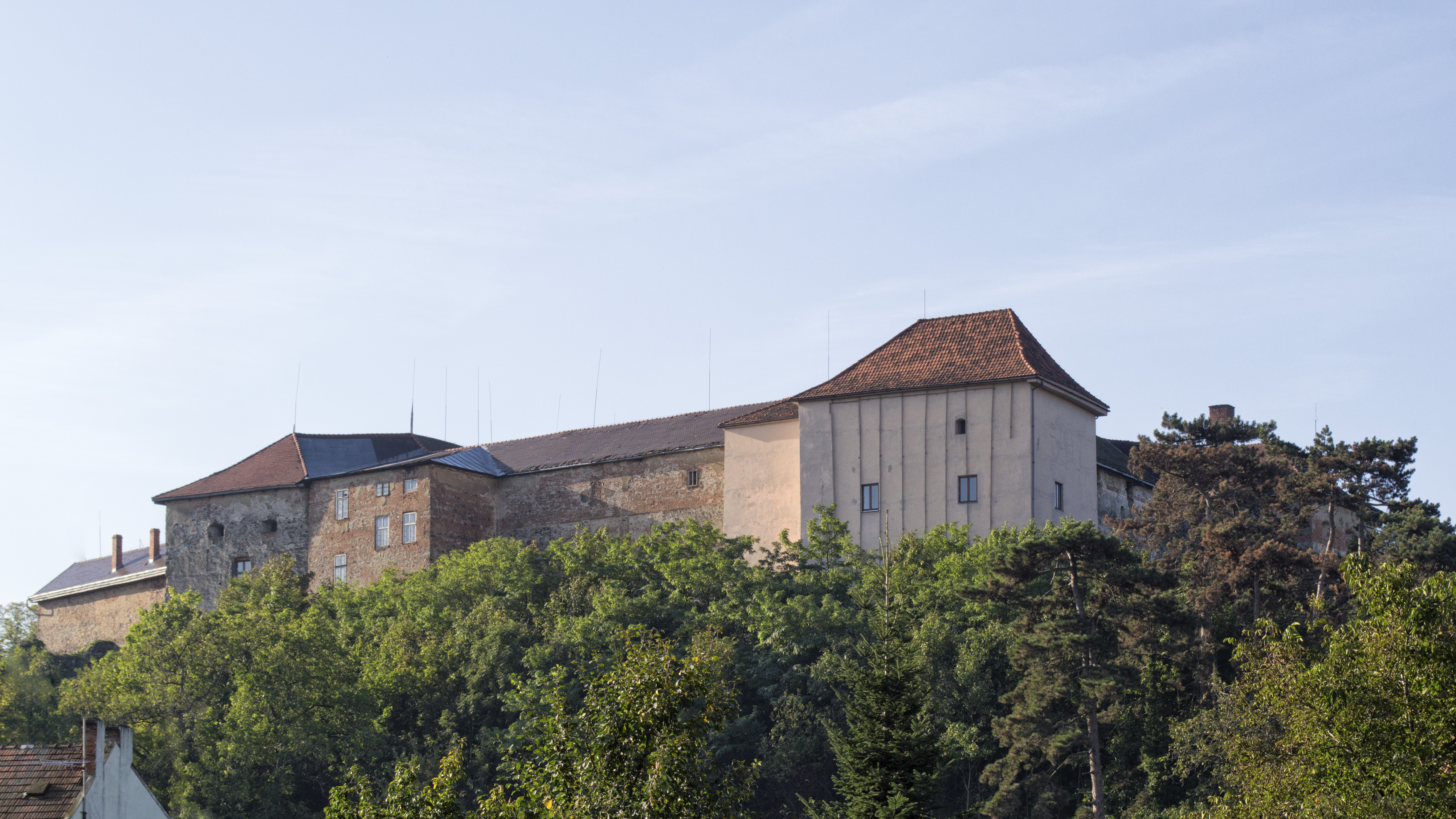 Замок-фортеця (мур.), Ужгород, вул.Капітульна, 33